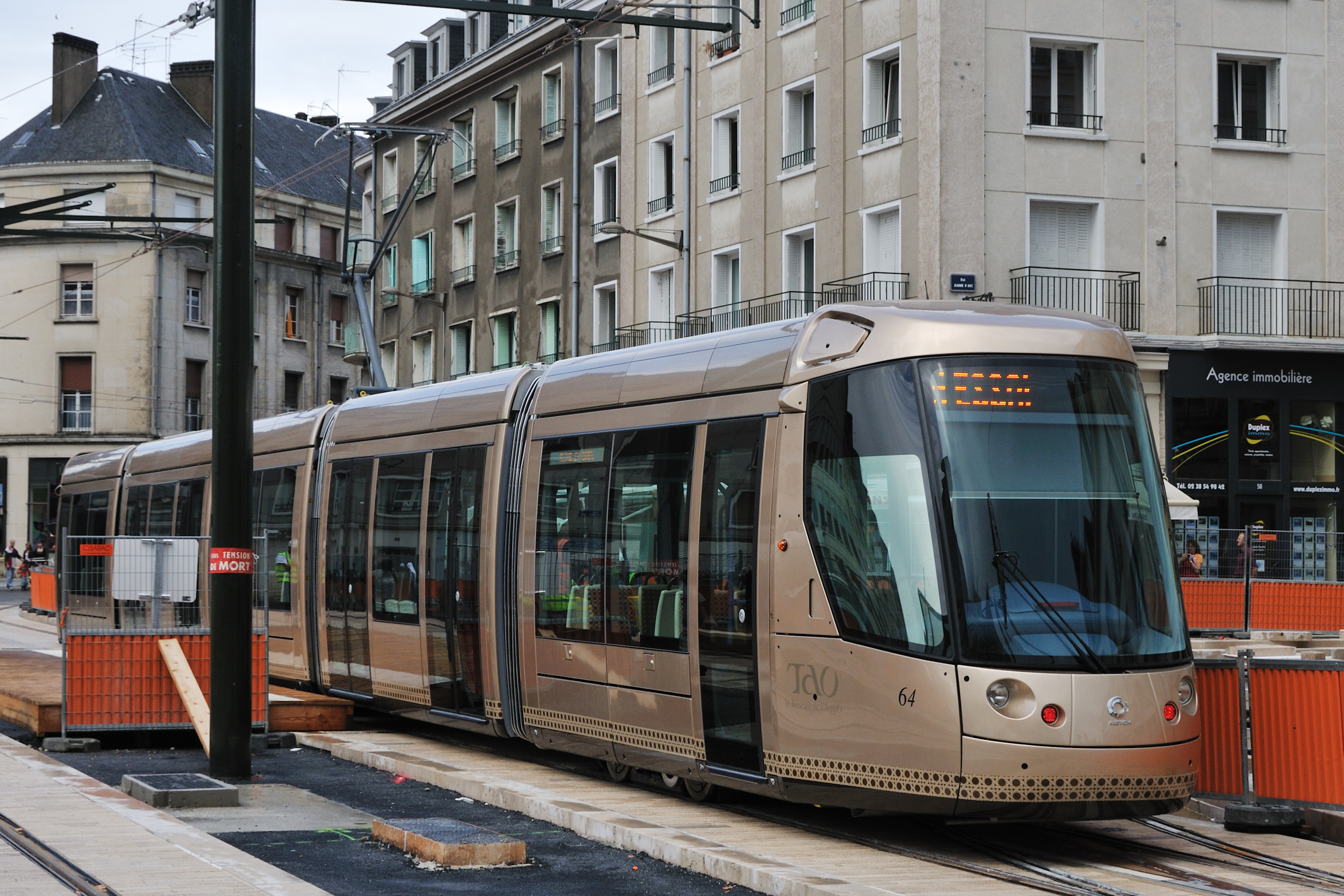 Rame Citadis 302 en essai place De Gaulle, pendant les travaux d'interconnexion entre ligne A et ligne B en construction, Orléans, Loiret, France